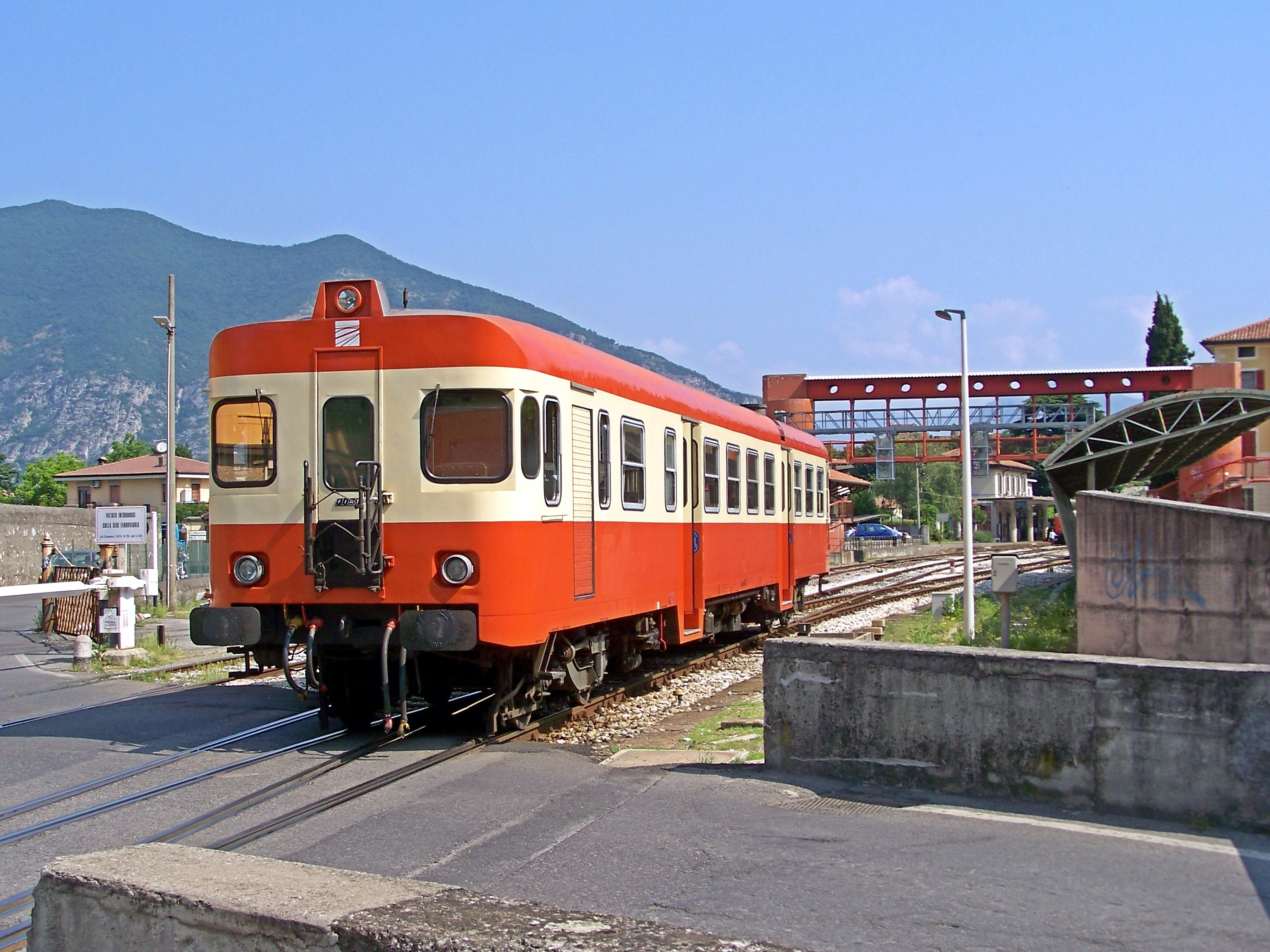 L'ALn 668.121 in livrea SNFT primo schema all'ingresso della stazione di Iseo.